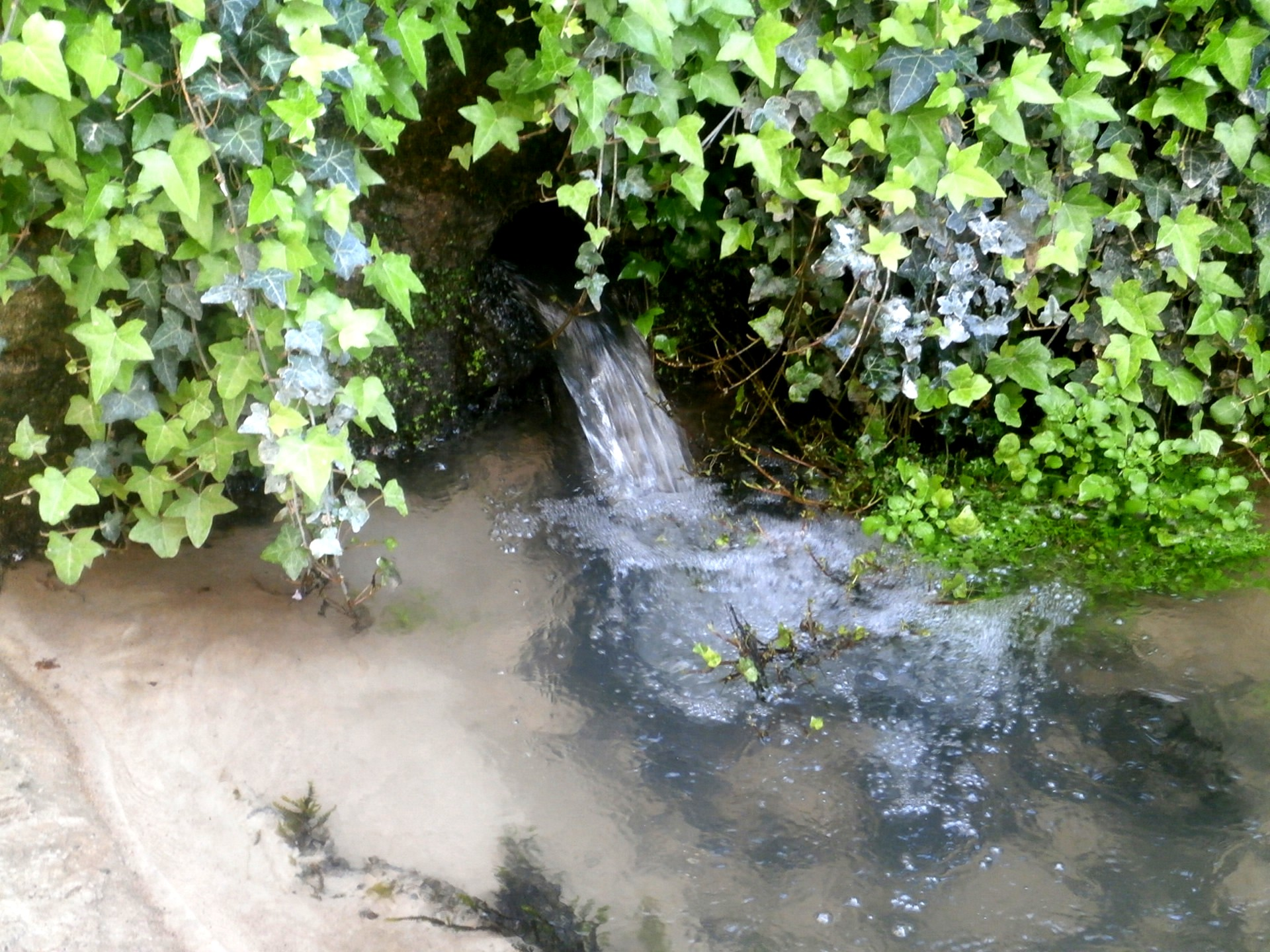 Résurgence de la Rouère avant son confluent avec l'Indrois.